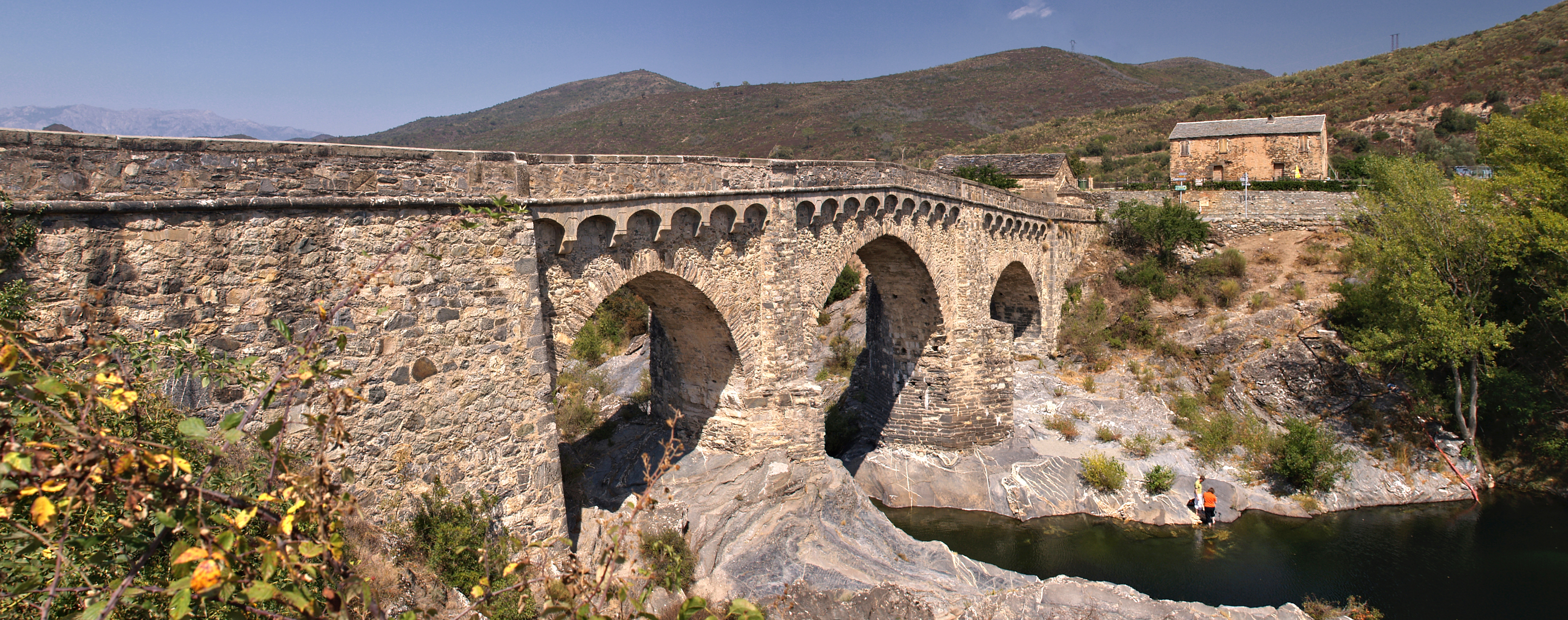 Altiani (Corsica) - Pont génois (MH)